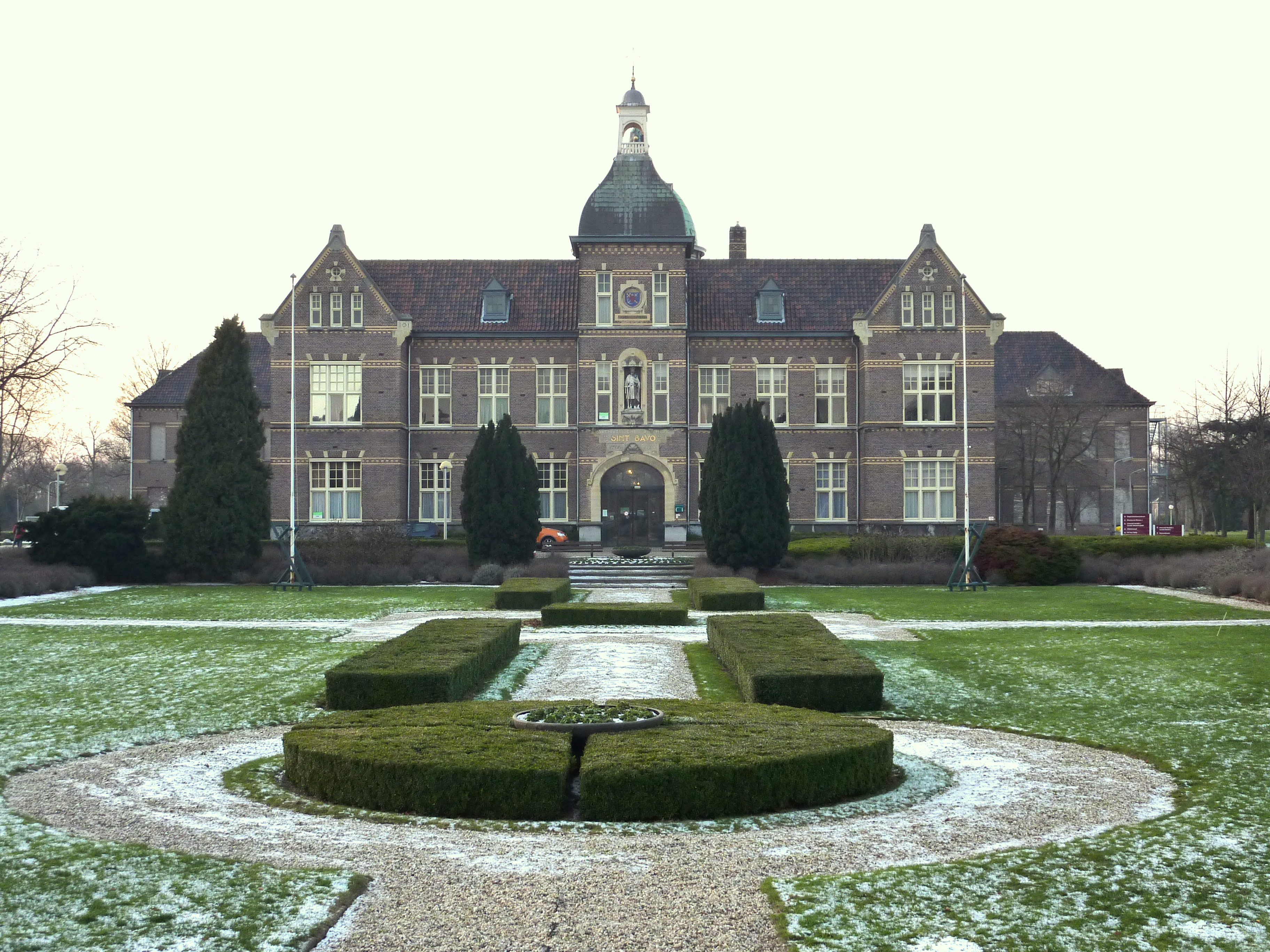 Noordwijkerhout, Sint Bavo, psychiatrisch ziekenhuis uit 1914